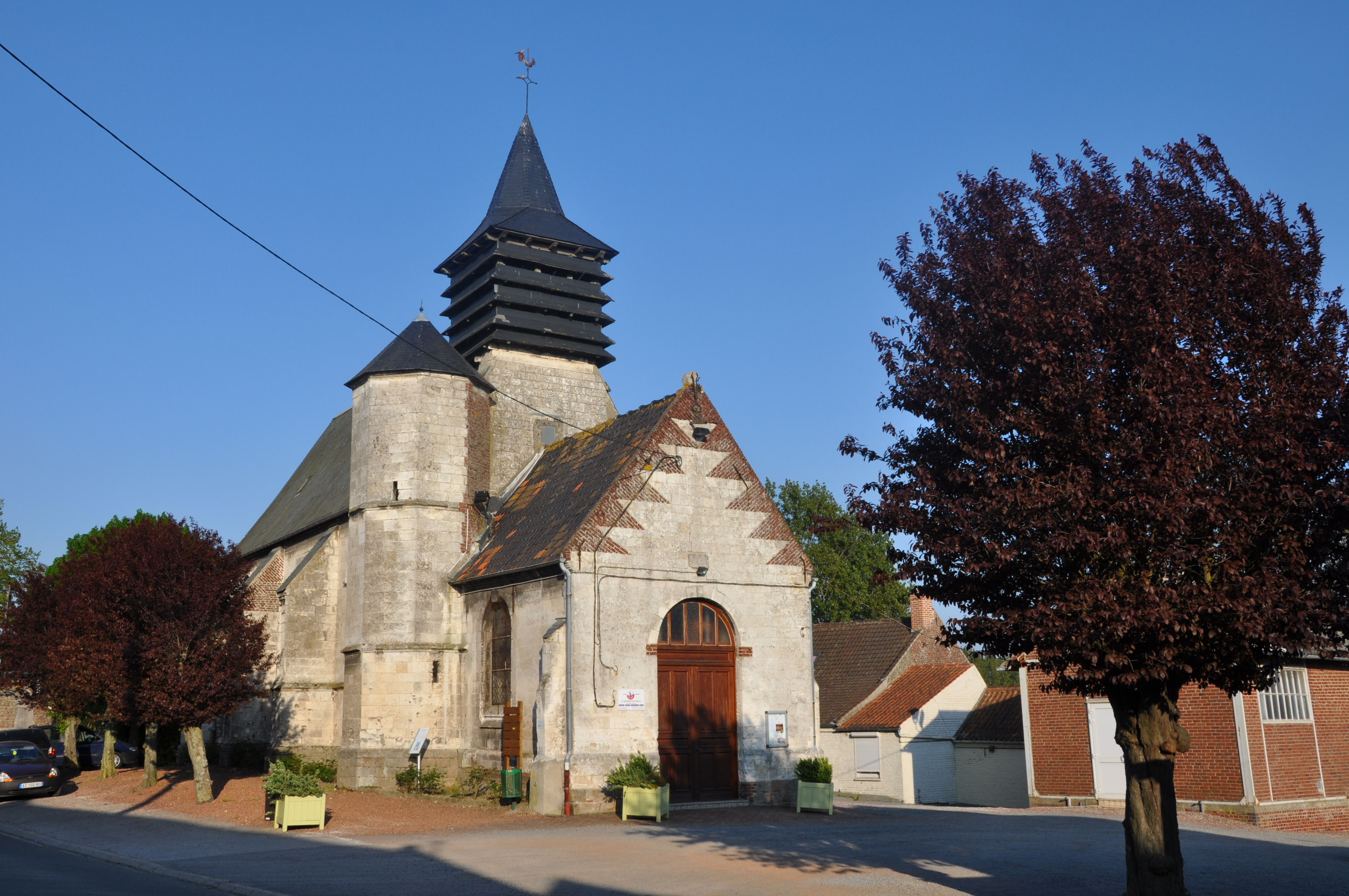 Eglise d'Ecquedecques